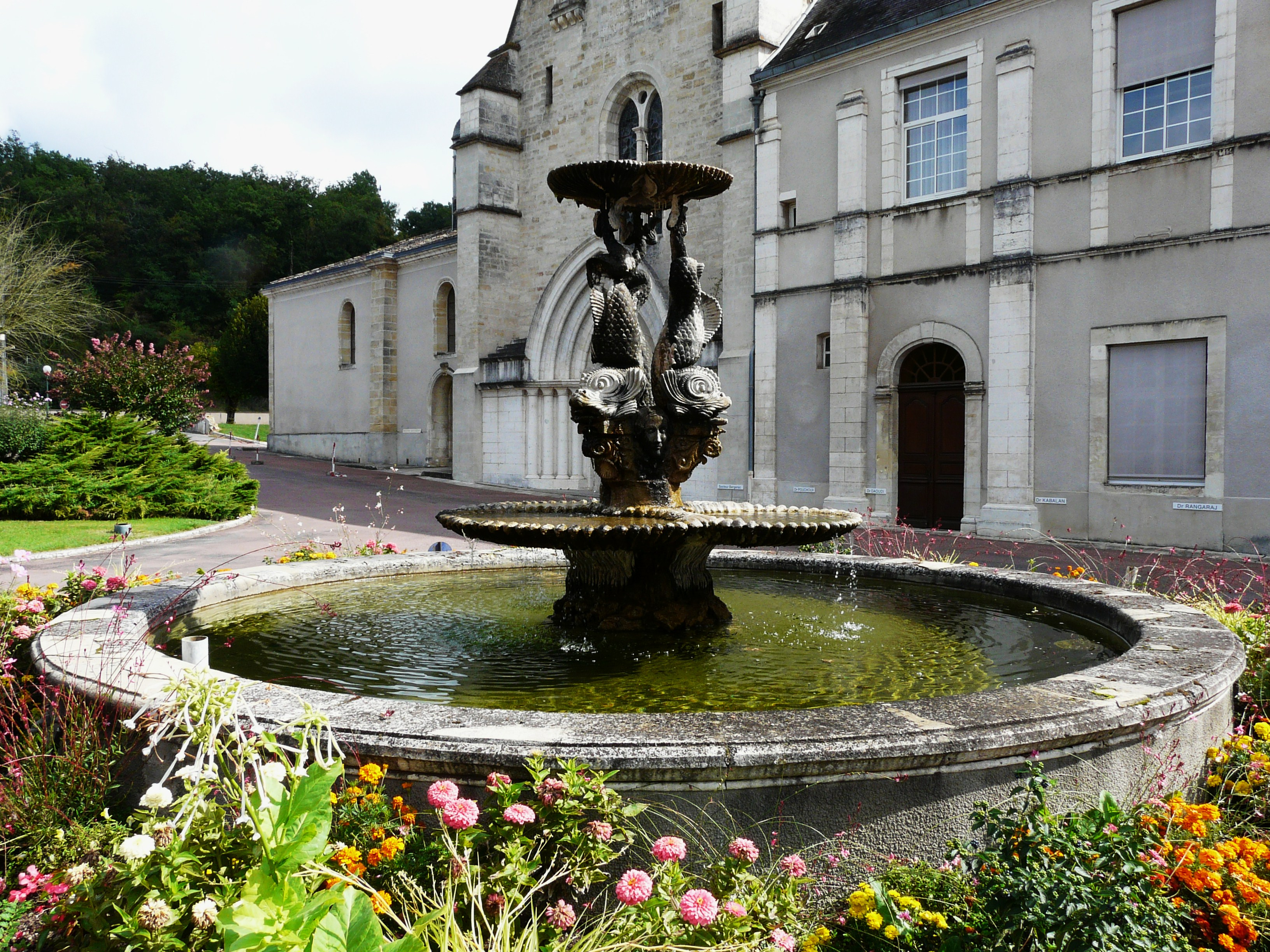 Fontaine devant la chartreuse de Vauclaire, Montpon-Ménestérol, Dordogne, France